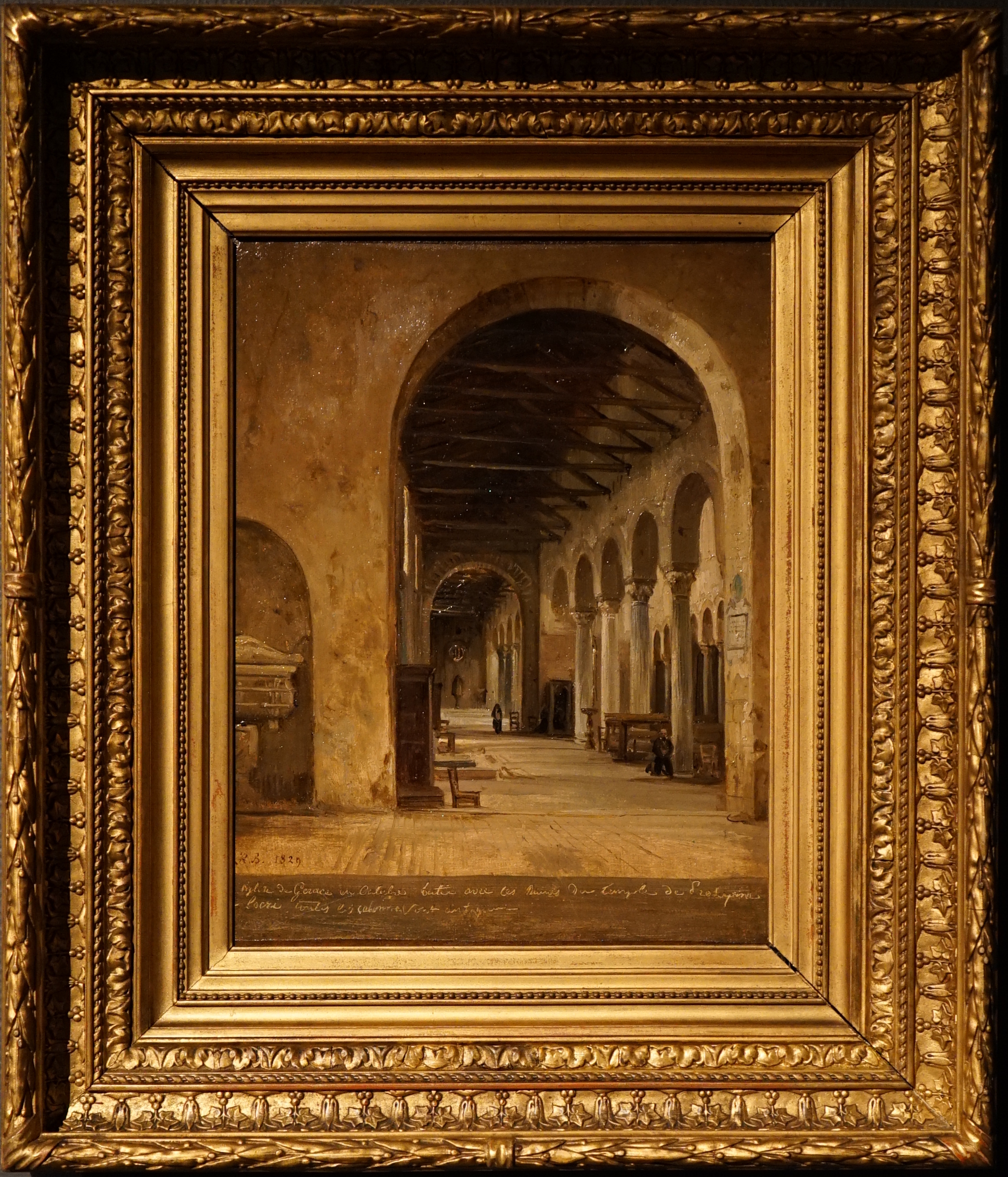 exposition temporaire d’œuvres du peintre.